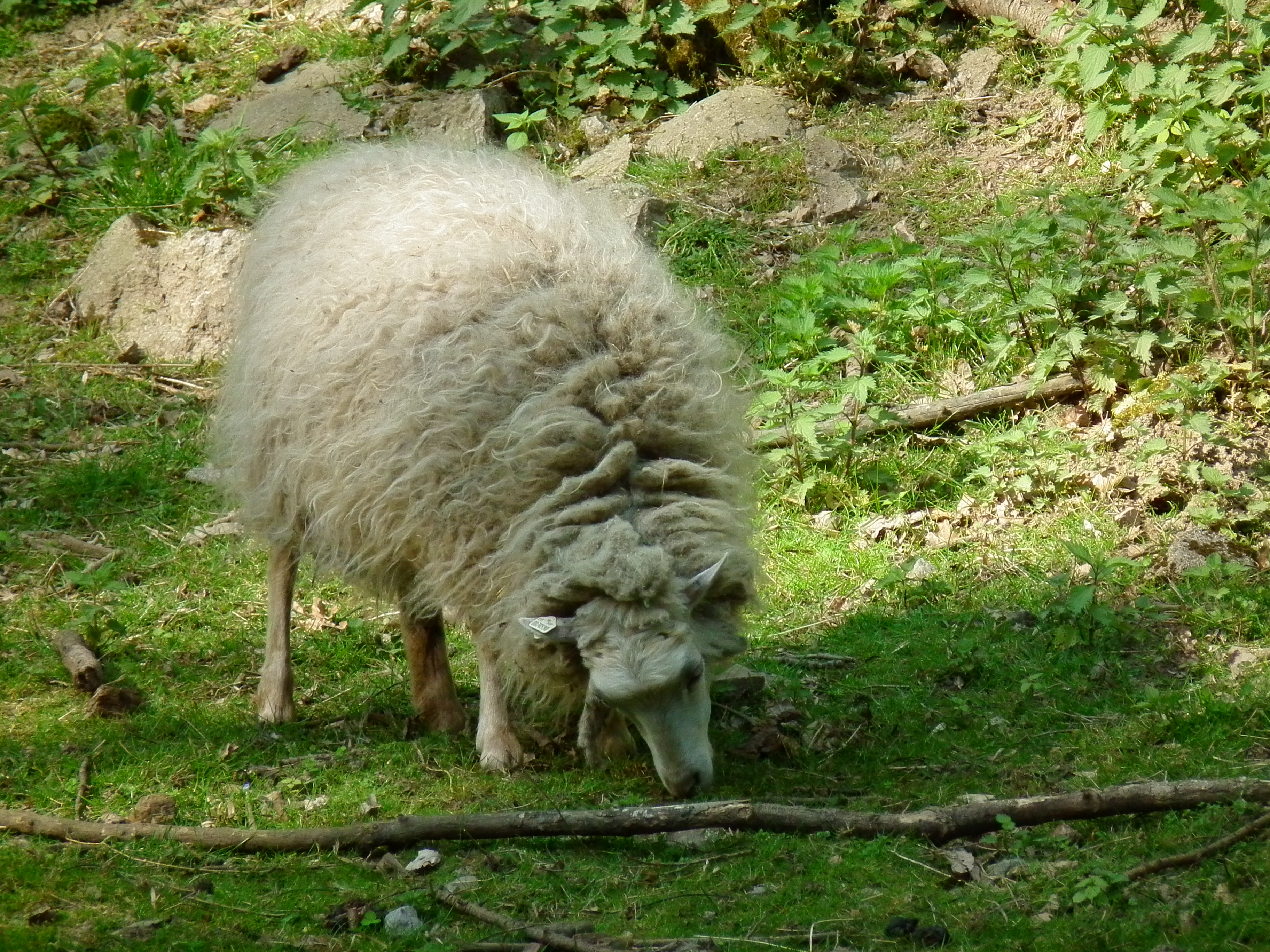 Skudde im Bergtierpark in Erlenbach (Hessen, Deutschland)